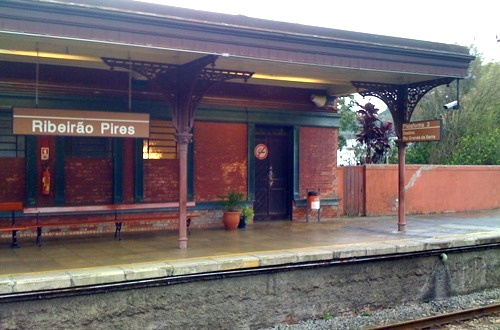 Plataforma da Estação Ribeirão Pires da Linha 10 da CPTM, sentido Rio Grande da Serra.